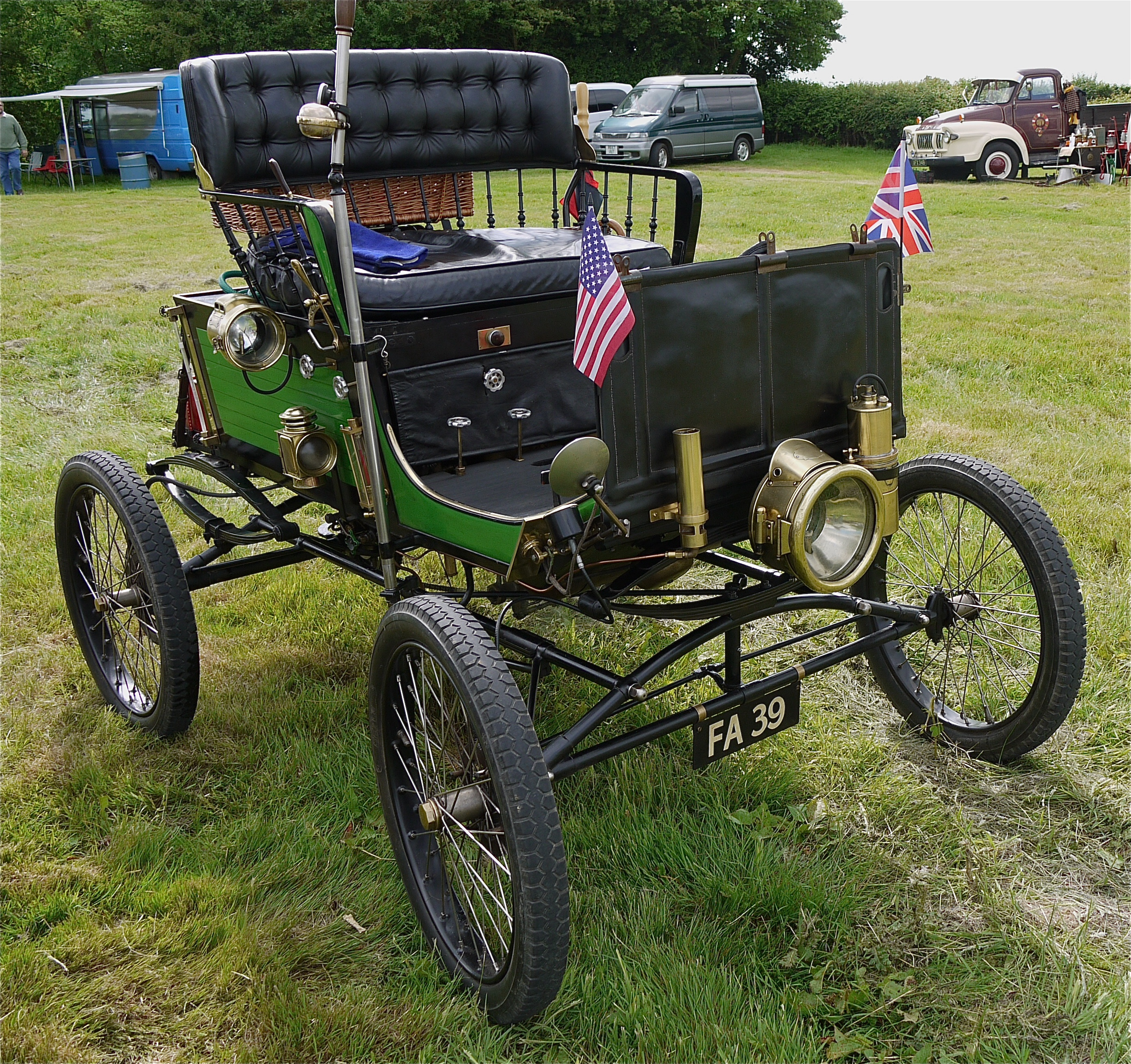 Panasonic G1 14-45 Lens